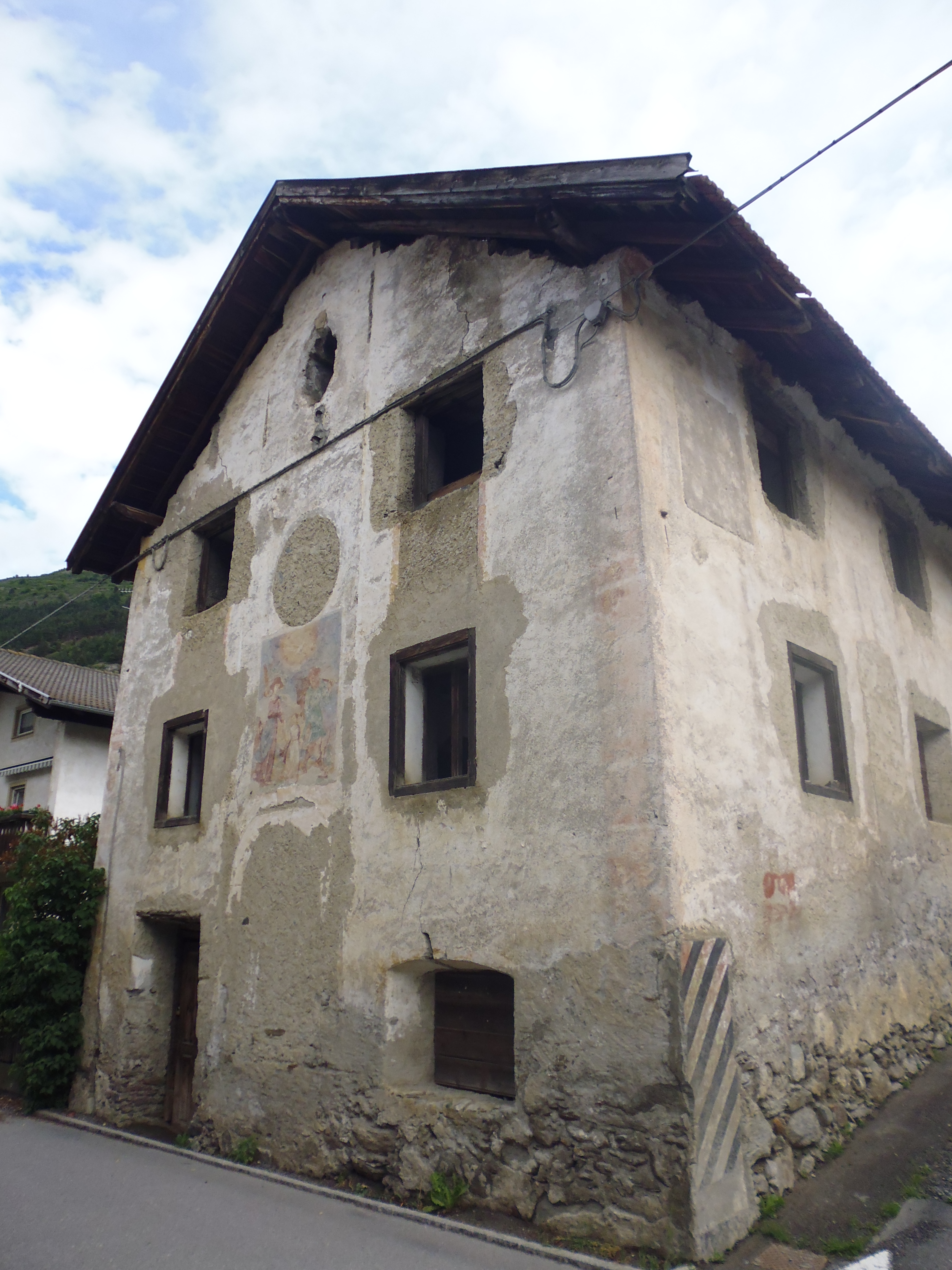 Ehgemalige St.-Josephs-Kapelle in Eyrs in Südtirol (Moosburgstraße 28)